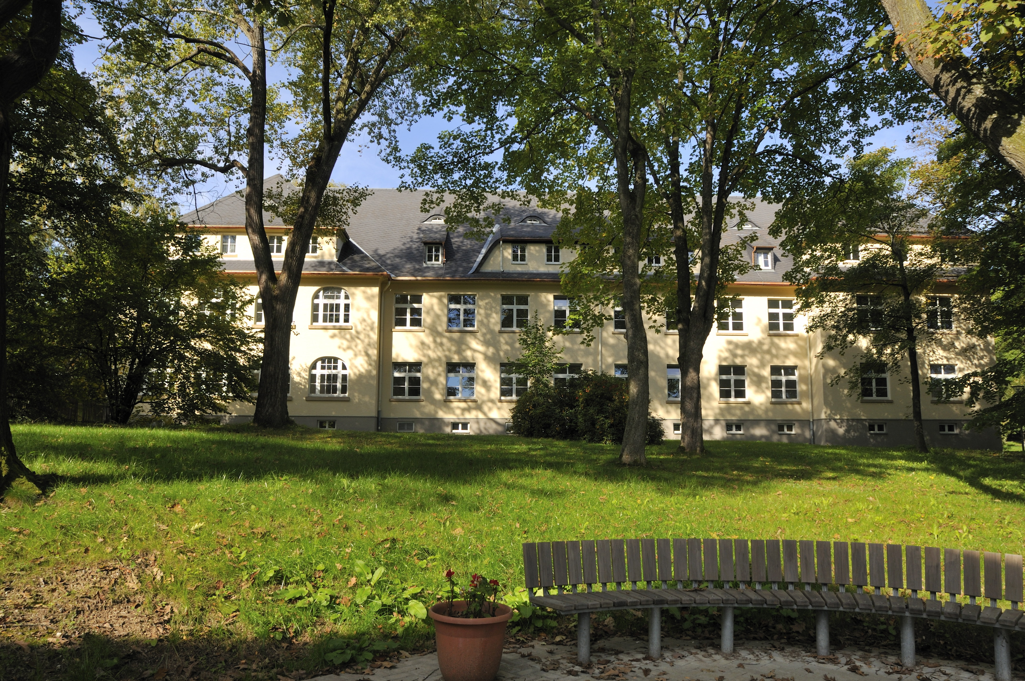 Außenansicht der Gerontopsychiatrie des Sächsischen Krankenhauses für Psychiatrie und Neurologie Rodewisch